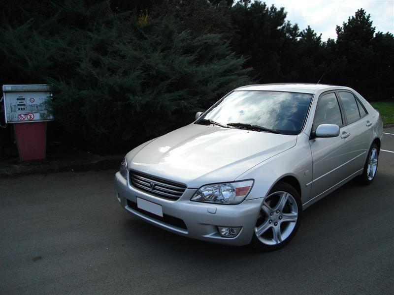 Toyota Altezza AS200 Z Edition